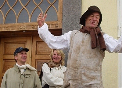 Niels Andersen, bagest skuespillerne Henrik Koefoed og Kirsten Olesen. Foto: Bjoern Andersen, 2004